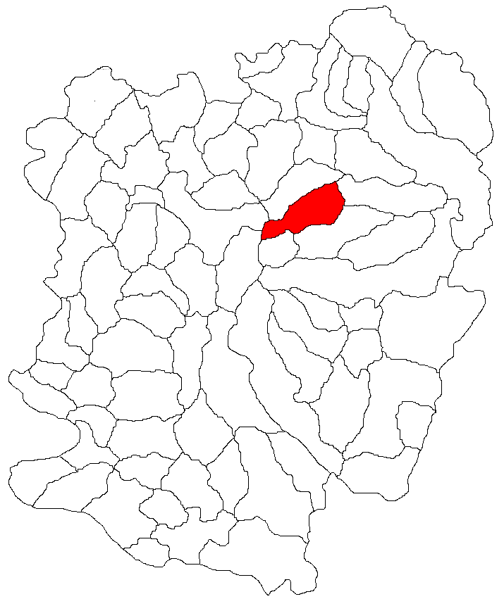 Categorie:Hărţi ale judeţului Caraş-Severin